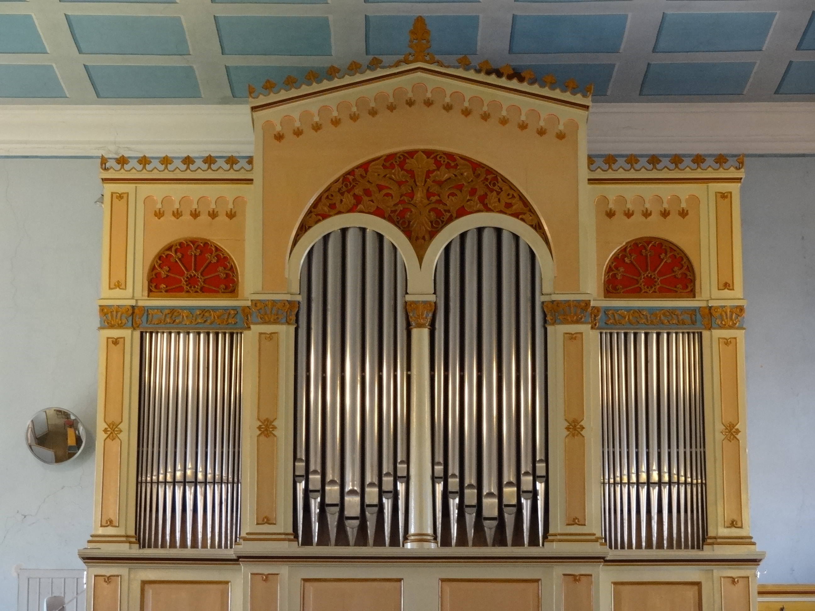 Evangelische Kirche Beuern